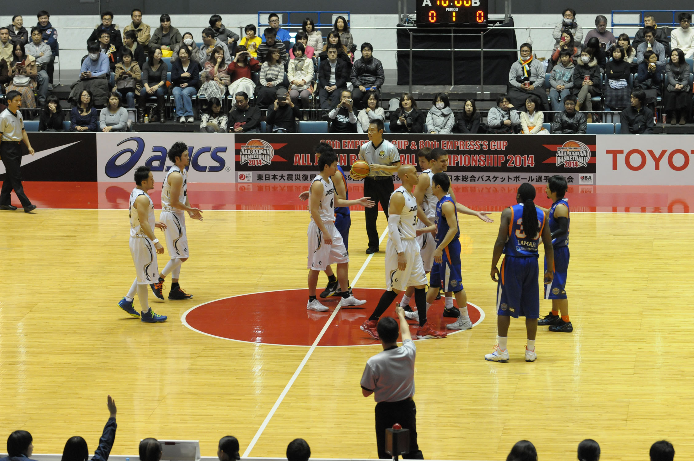 2014年全日本総合バスケットボール選手権大会準々決勝、アイシンシーホース三河対つくばロボッツ。代々木第一体育館で。